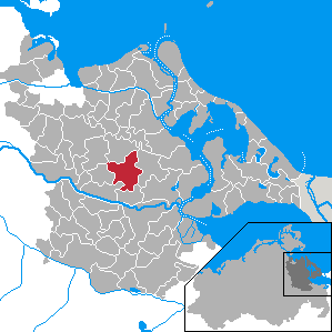 Klein Bünzow, Landkreis Ostvorpommern, Mecklenburg-Vorpommern